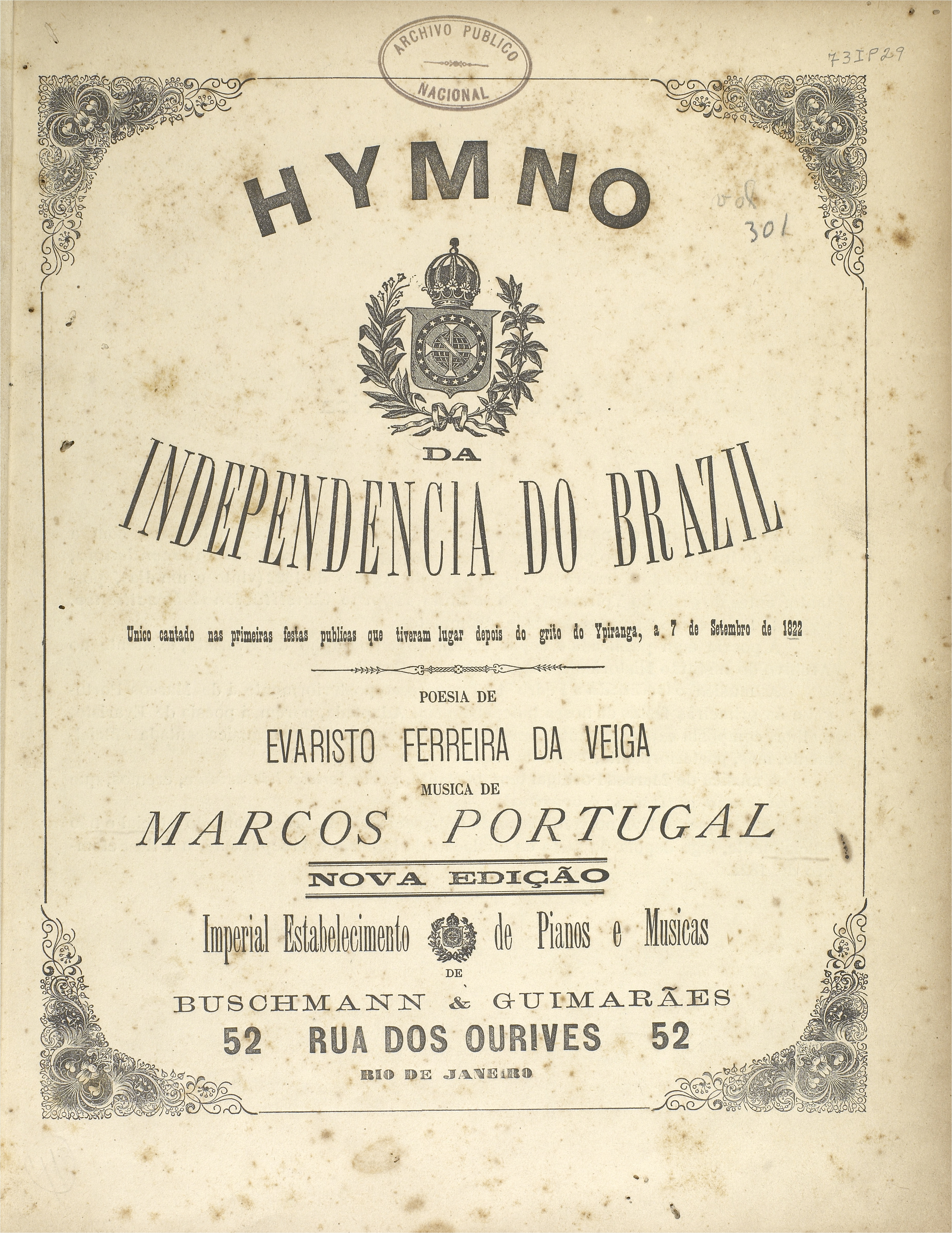 Hino da Independência do Brasil. Fundo Itens Documentais.